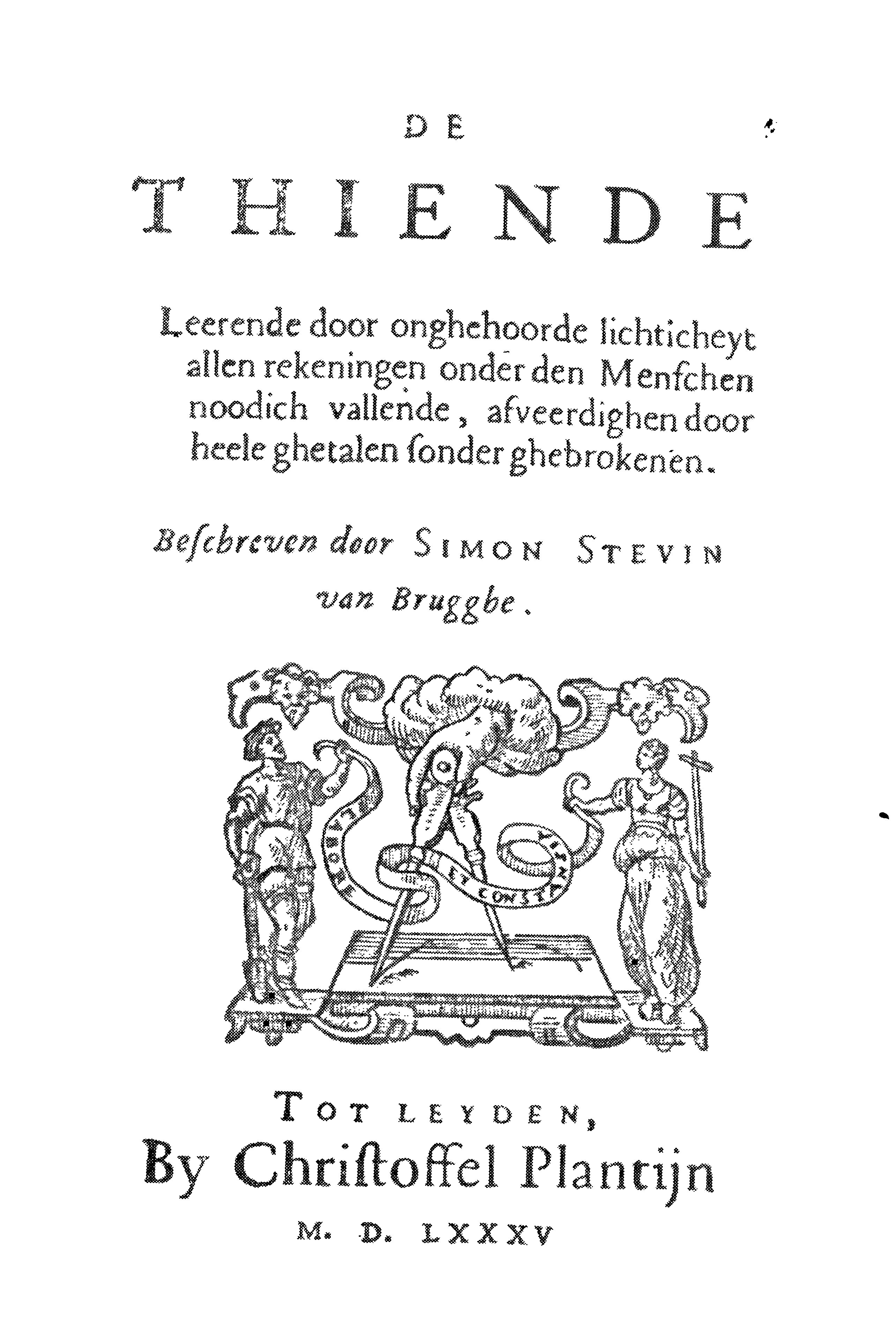 Титульный лист трактата Стевина "Десятая"